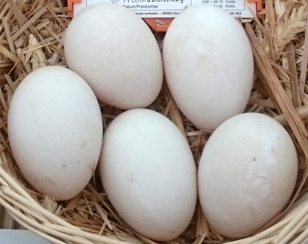 Eier der Sachsenenten BraLa (Brandenburgische Landwirtschaftsausstellung) in Paaren/Glien